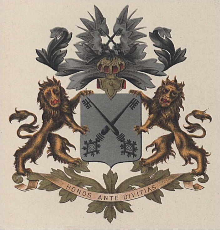 Wapen Schimmelpenninck